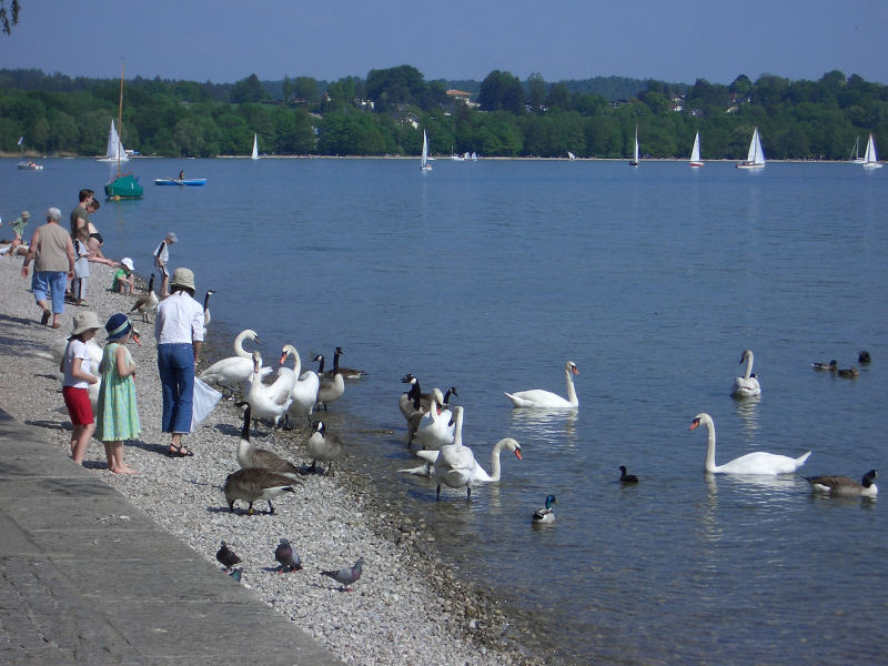 Parte del lago di Starnberg, Germania; opera di Massimo Greco, fotocamera digitale.